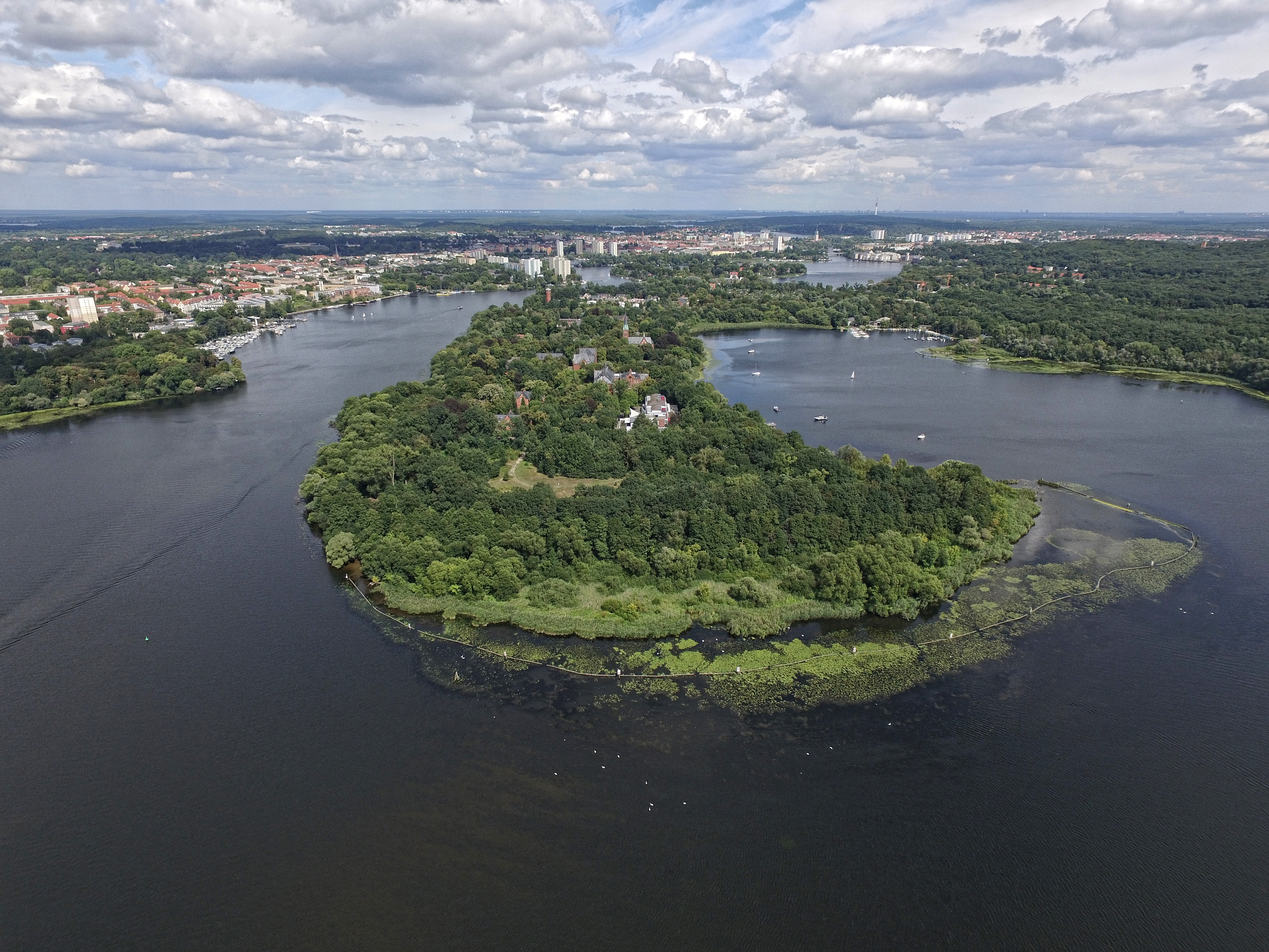 Potsdam, Blick auf die Südspitze Hermannswerders und den nördlichsten Teil des Templiner Sees